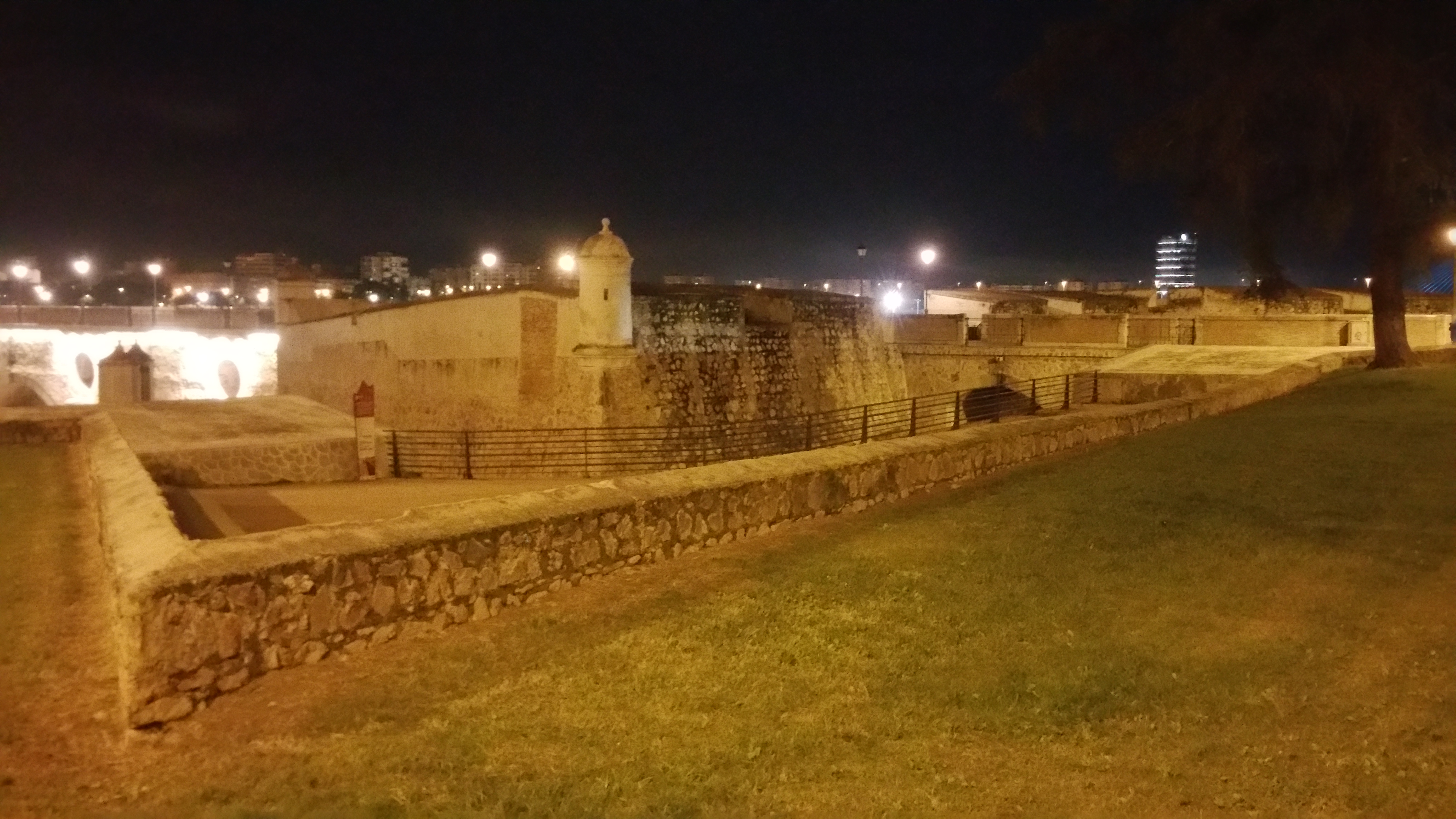 Flanco derecho